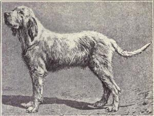 Griffon Vendeen from 1915